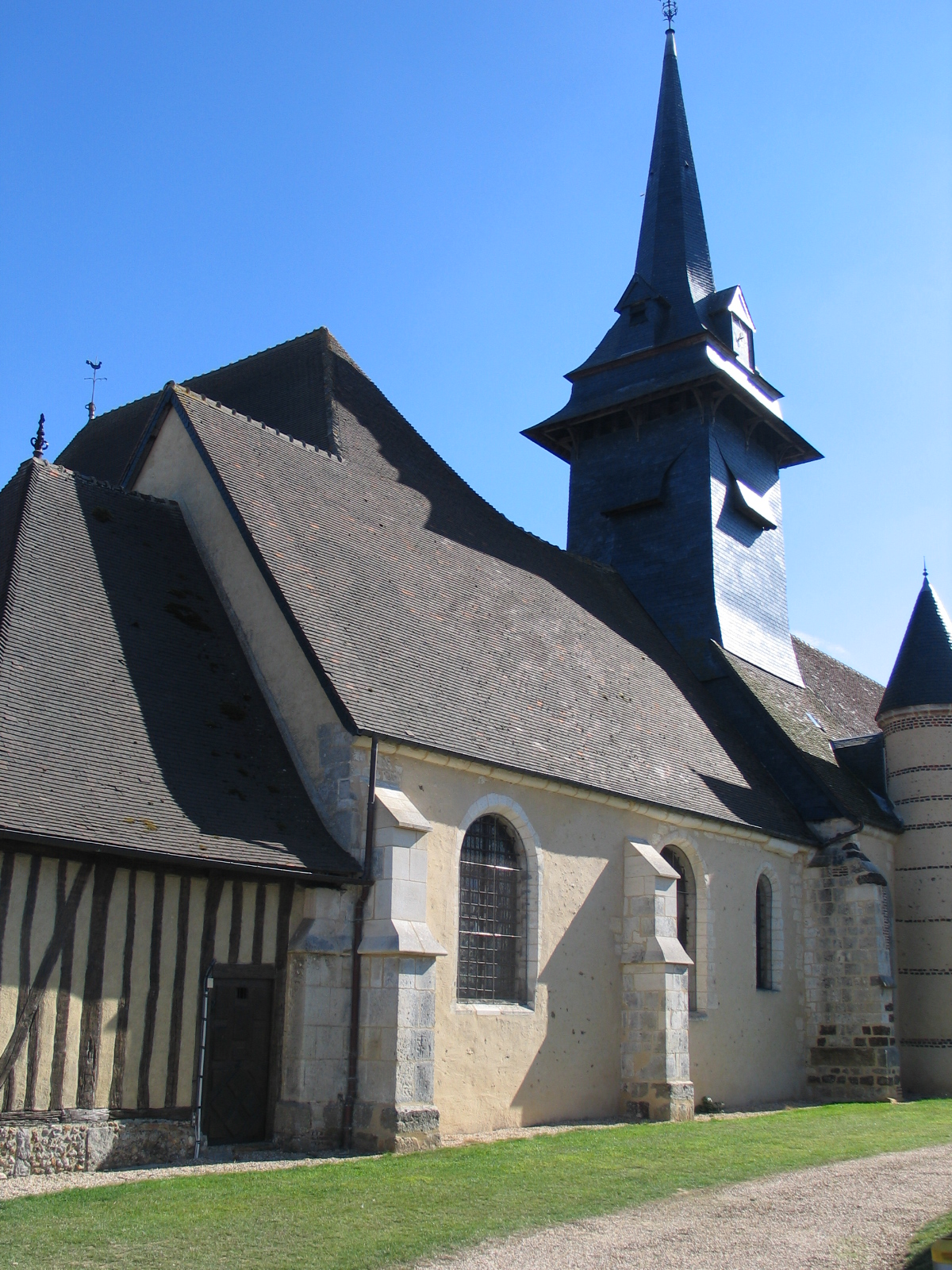 Une vue de l'église Saint-Eloi, au Fidelaire.